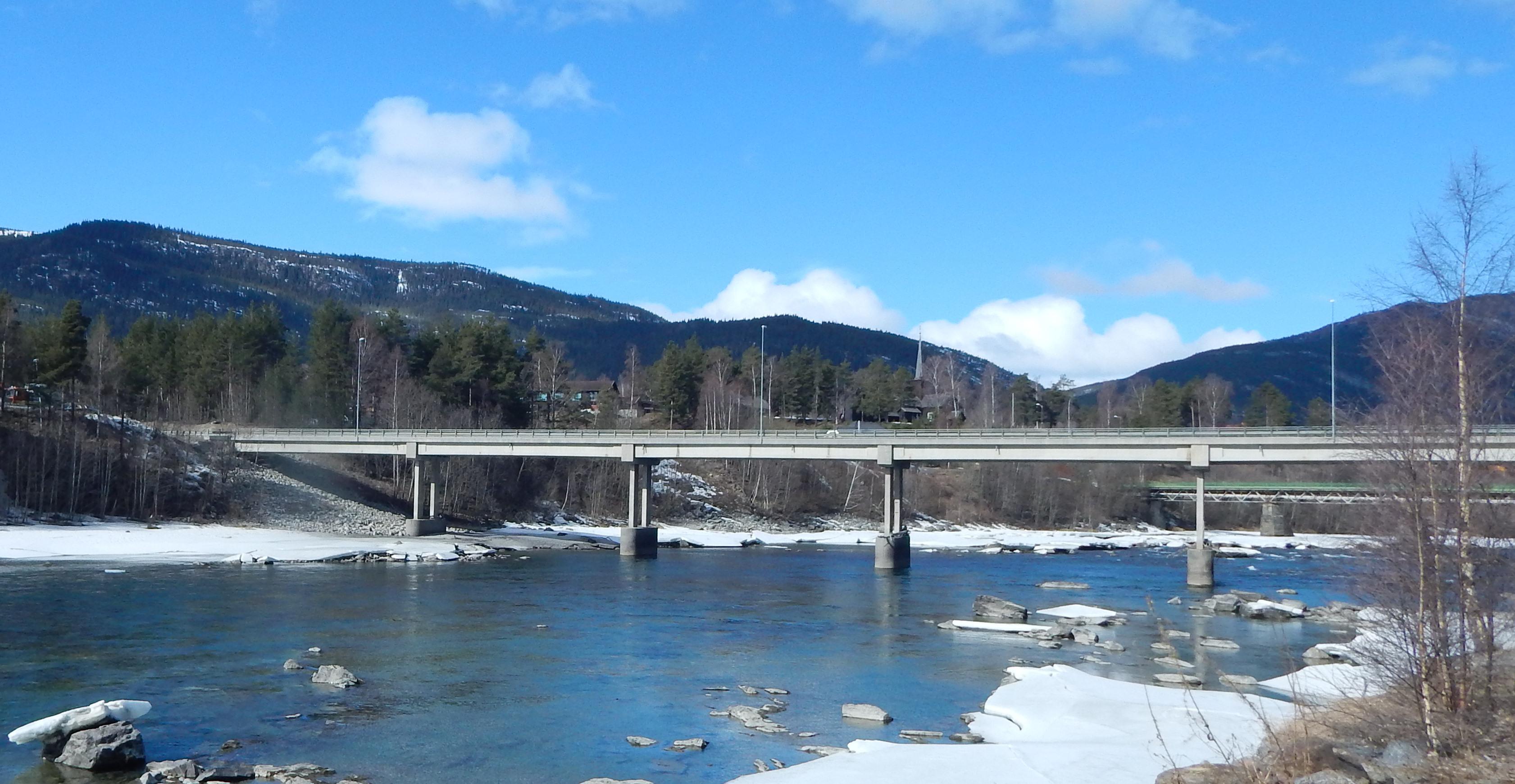 Byrbrua på Vinstra